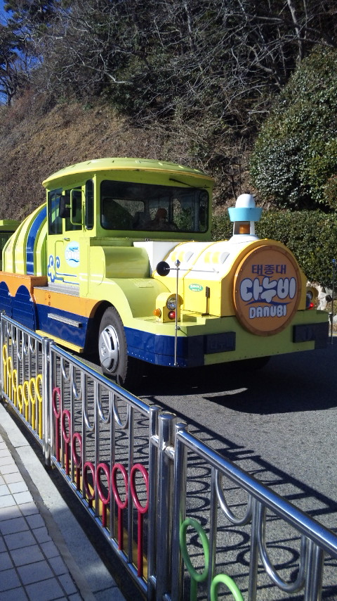 太宗台公園内列車形遊覧バス「タヌビ」